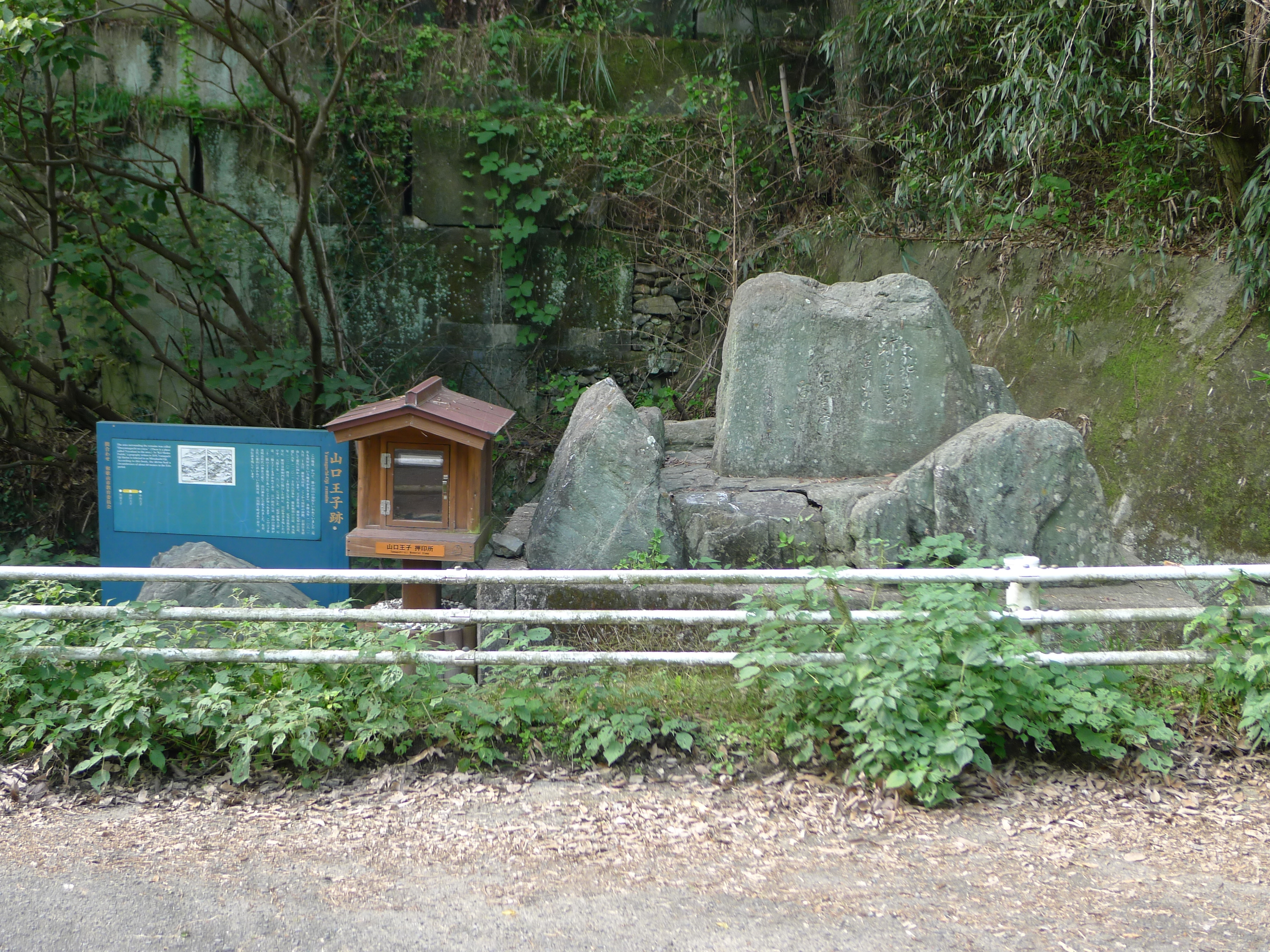 熊野古道・紀伊路の九十九王子の一つ山口王子（和歌山県和歌山市）